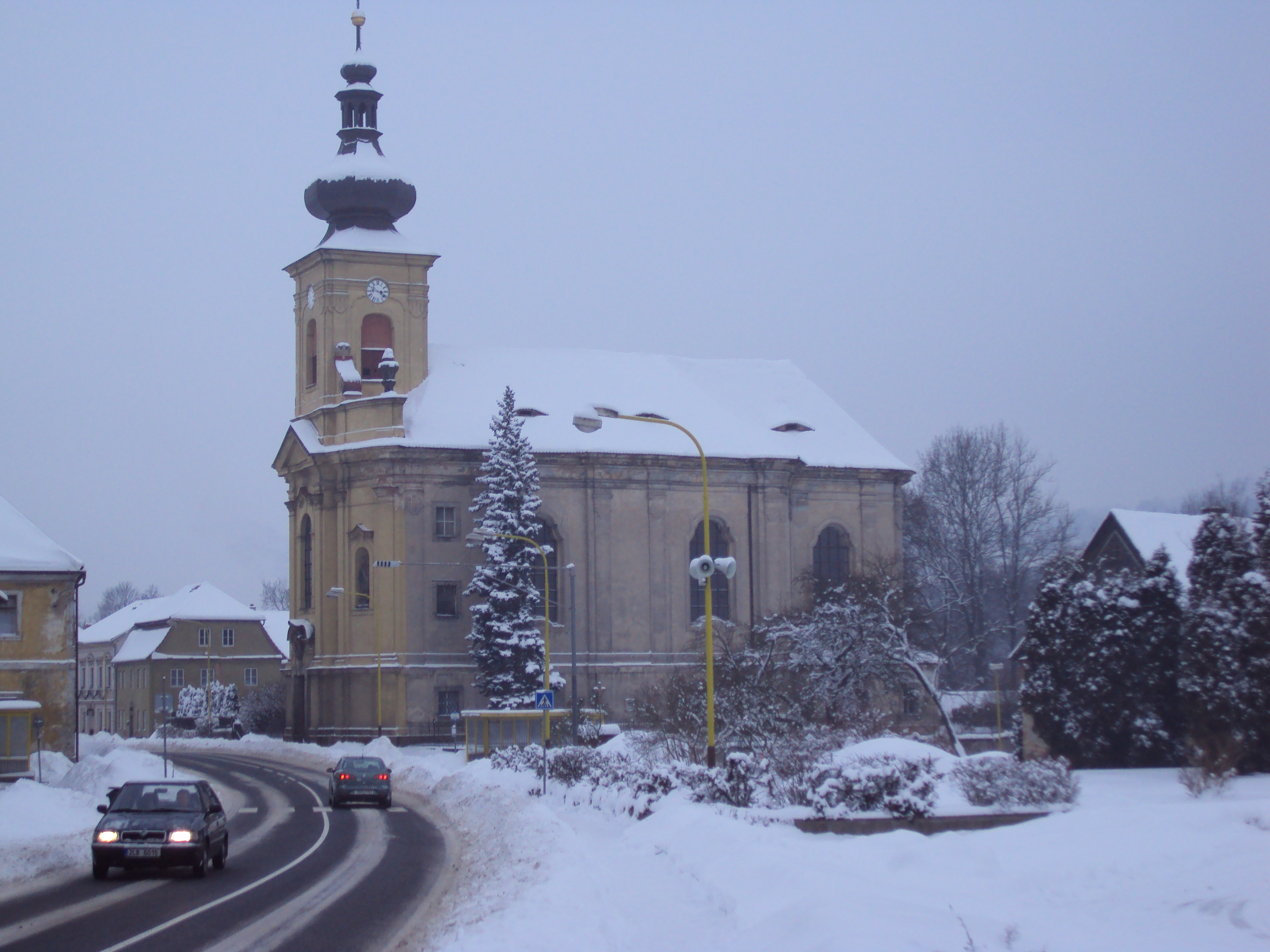 Kostel v Jezvé u silnice, uzavřen, neoznačen